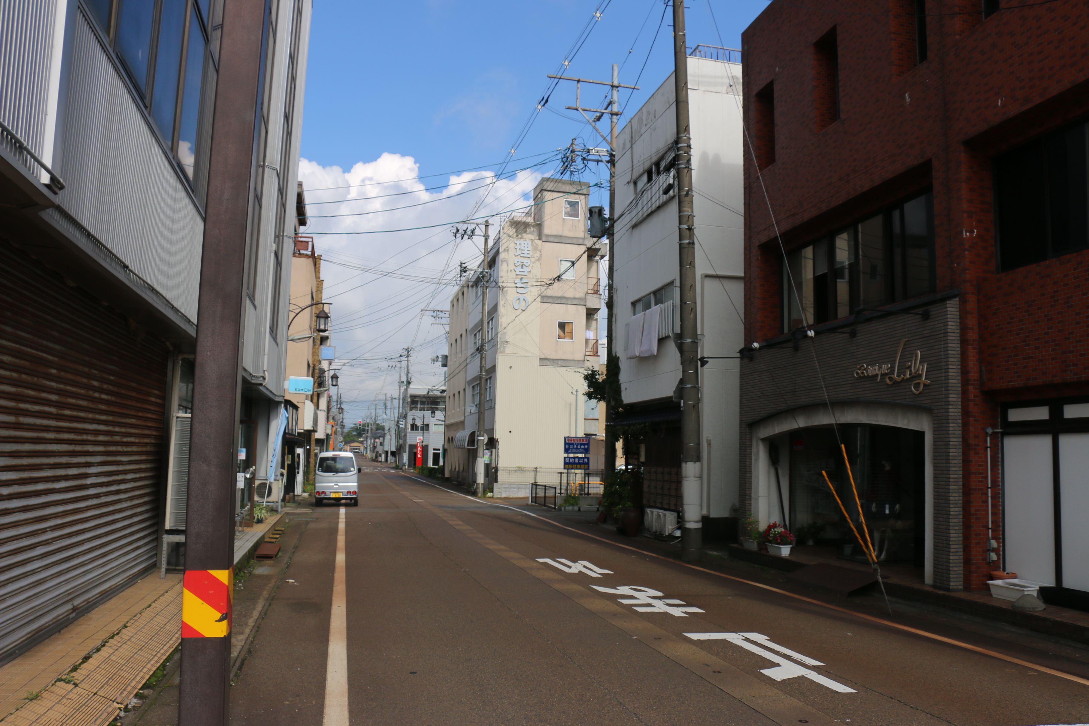 吉田駅から起点方向を臨む